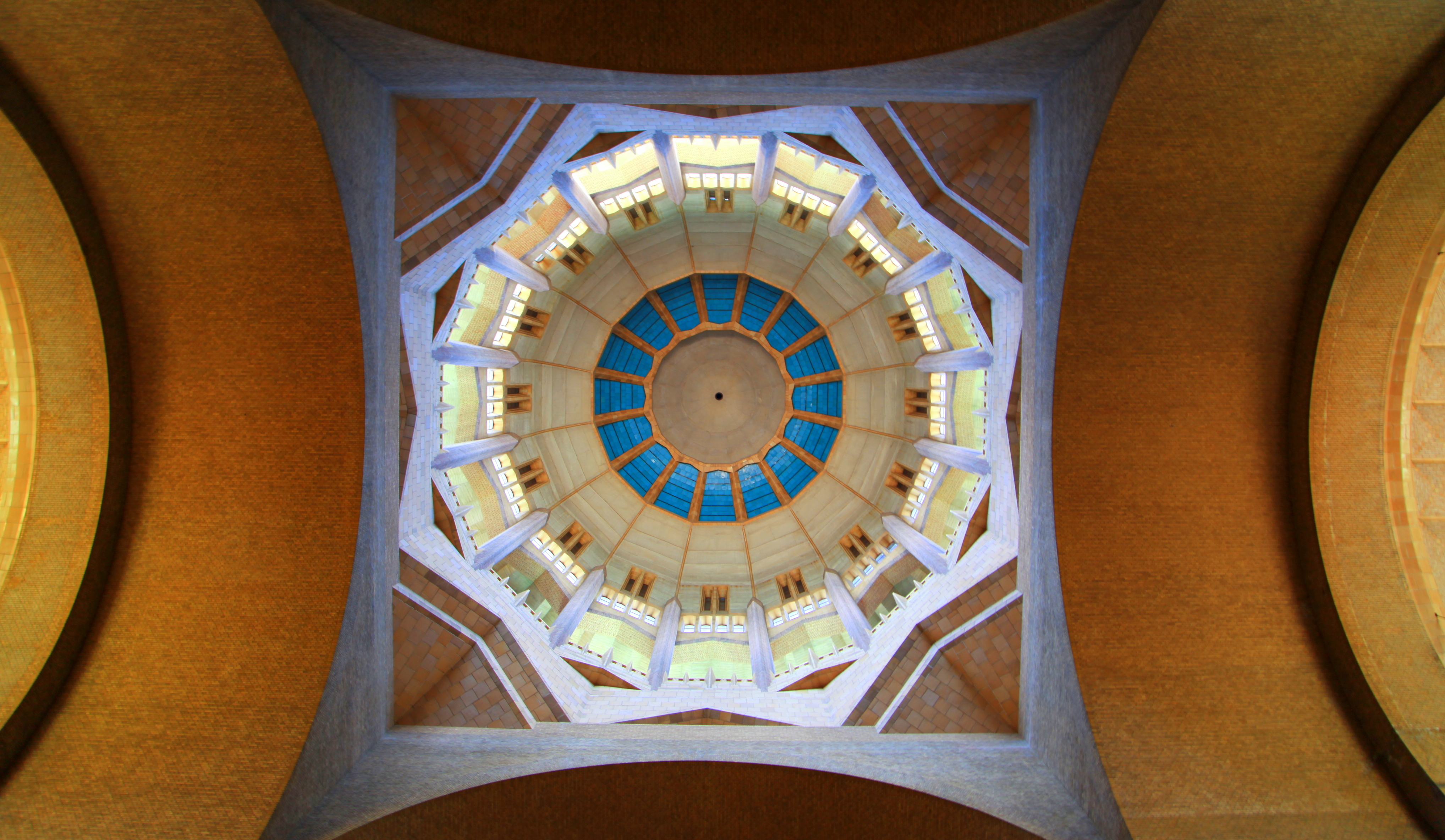 Vue du dessous du dome de la basilique de Koekelberg